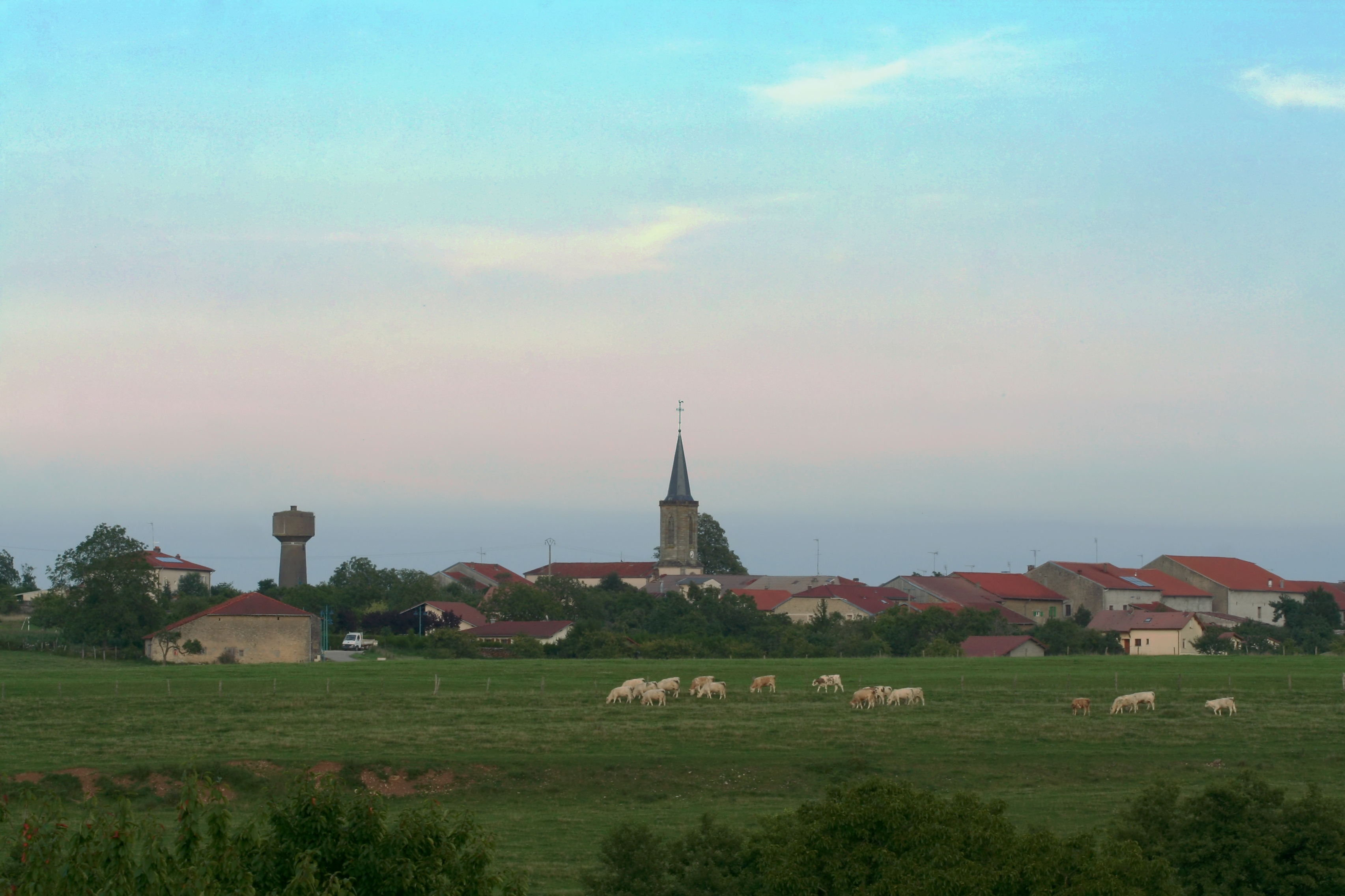 Vue d'ensemble de Moyemont (Vosges) depuis Saint-Genest